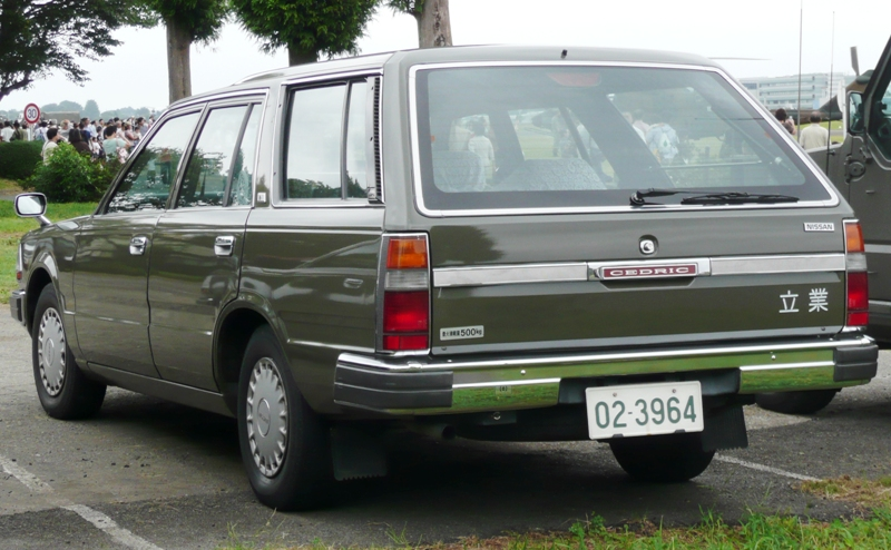 業務車1号。立川防災航空祭にて撮影。